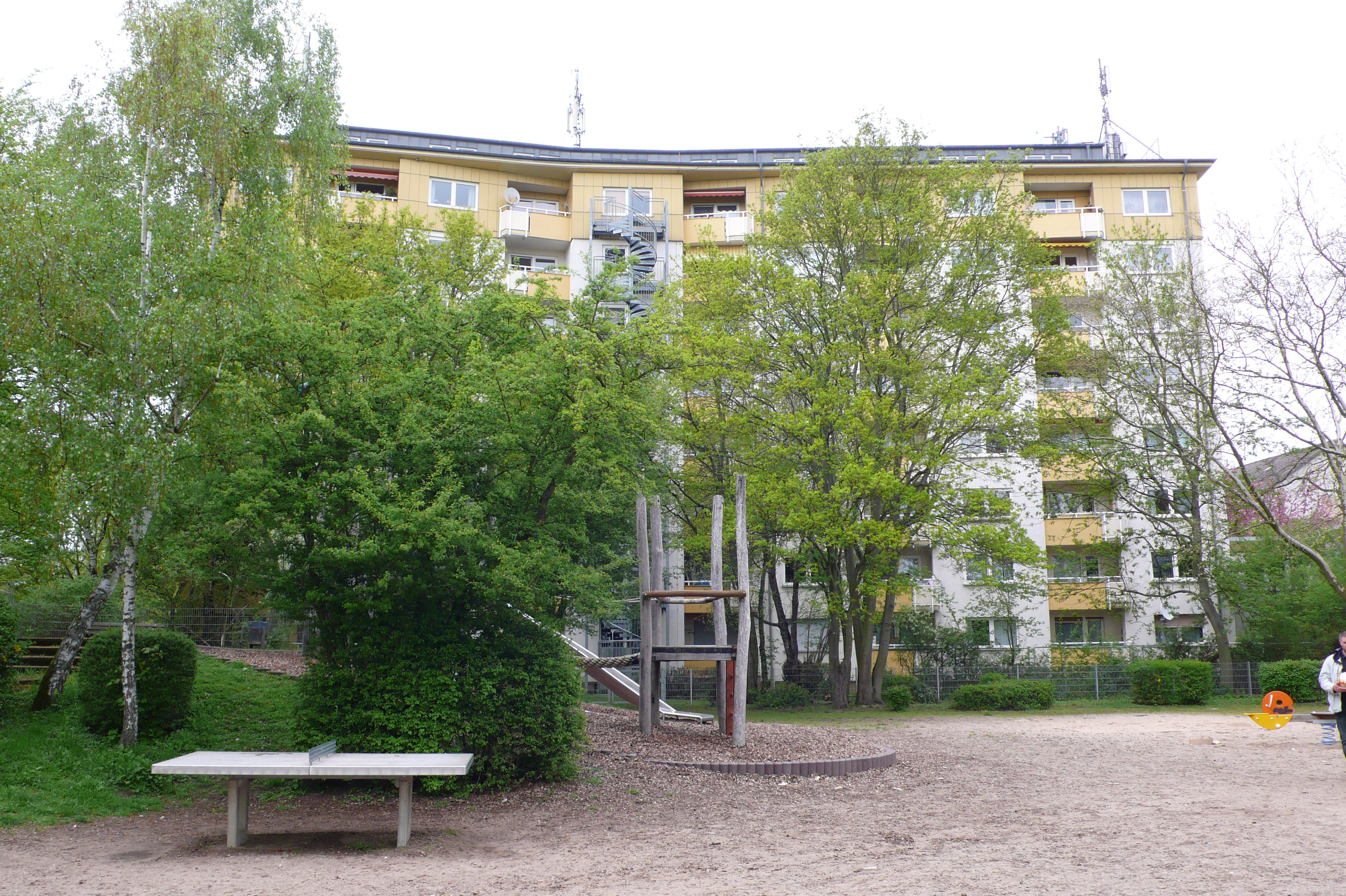 50er Jahre Siedlung in Frankfurt-Eschersheim, Wohnhochhaus und Spielplatz